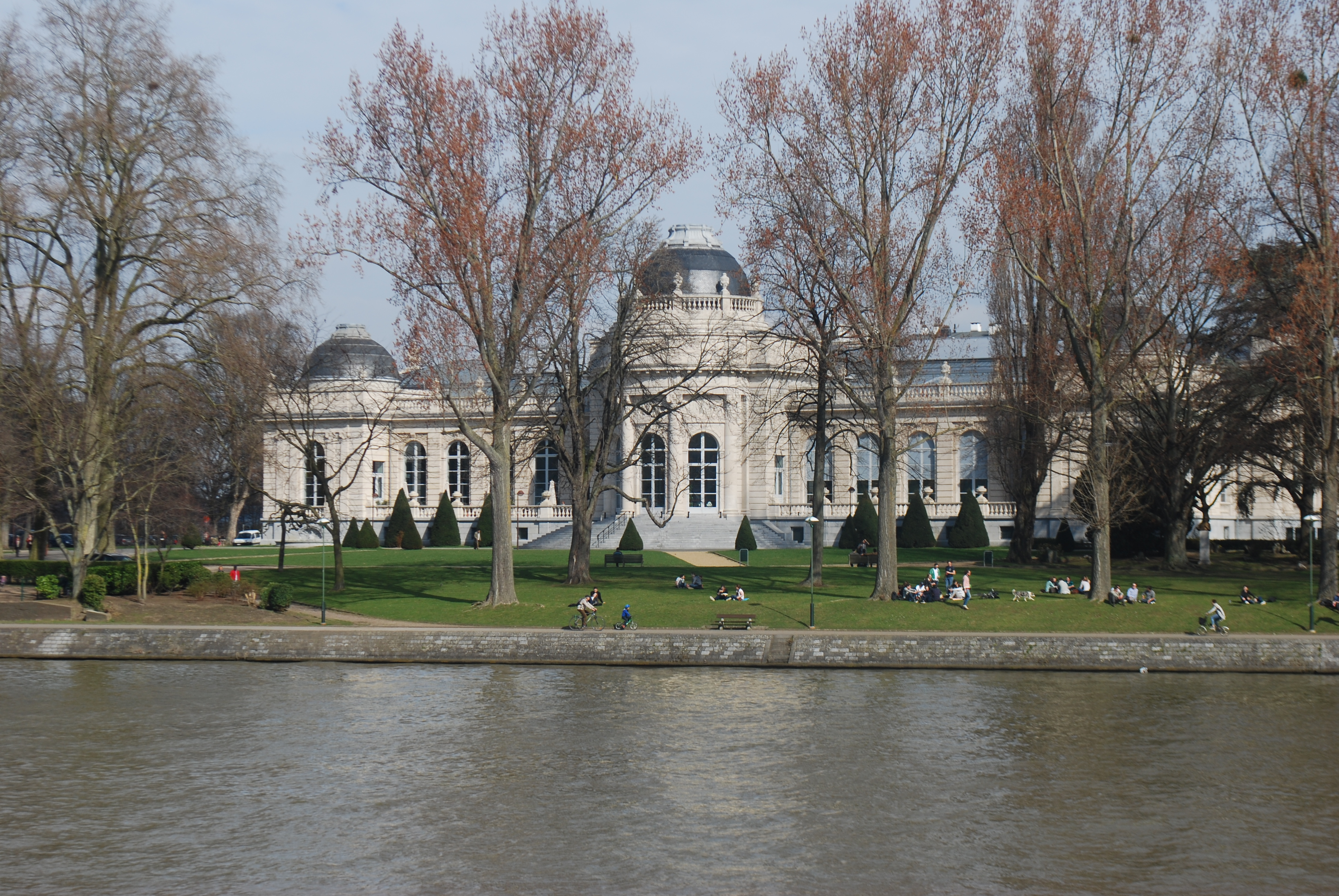 Vue des bords de la Meuse à Liège, entre le pont de chemin de fer du Val Benoît et le pont Albert Ier.